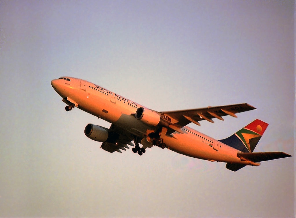 SAA A300-B2K-3C ZS-SDA